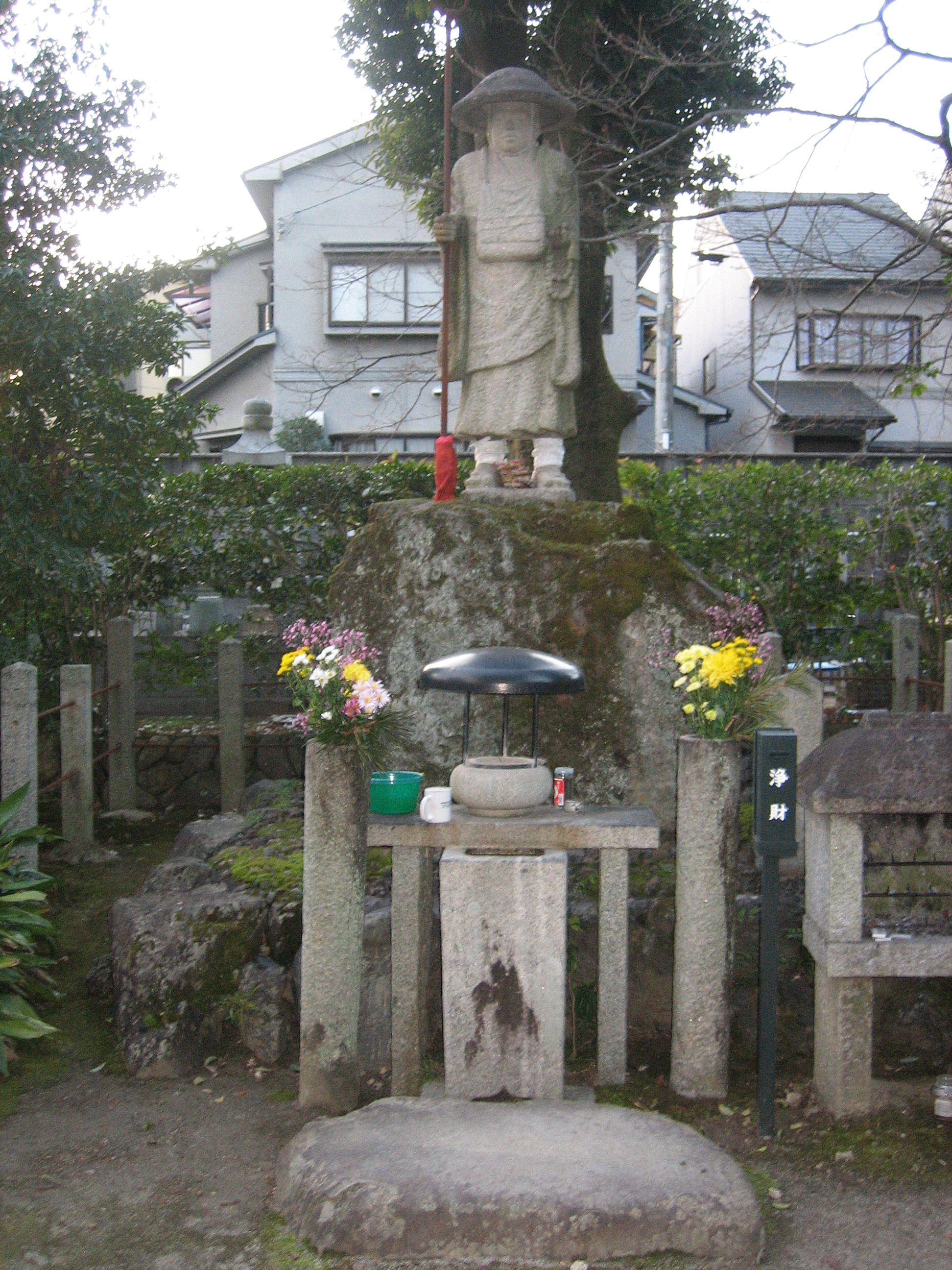 神光院境内の弘法大師石像を撮影